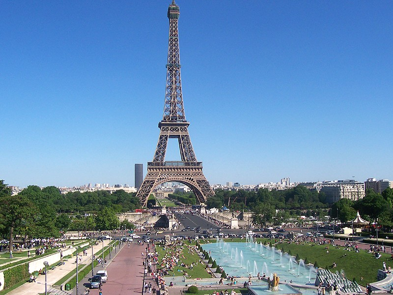 Parigi - Tour Eiffel